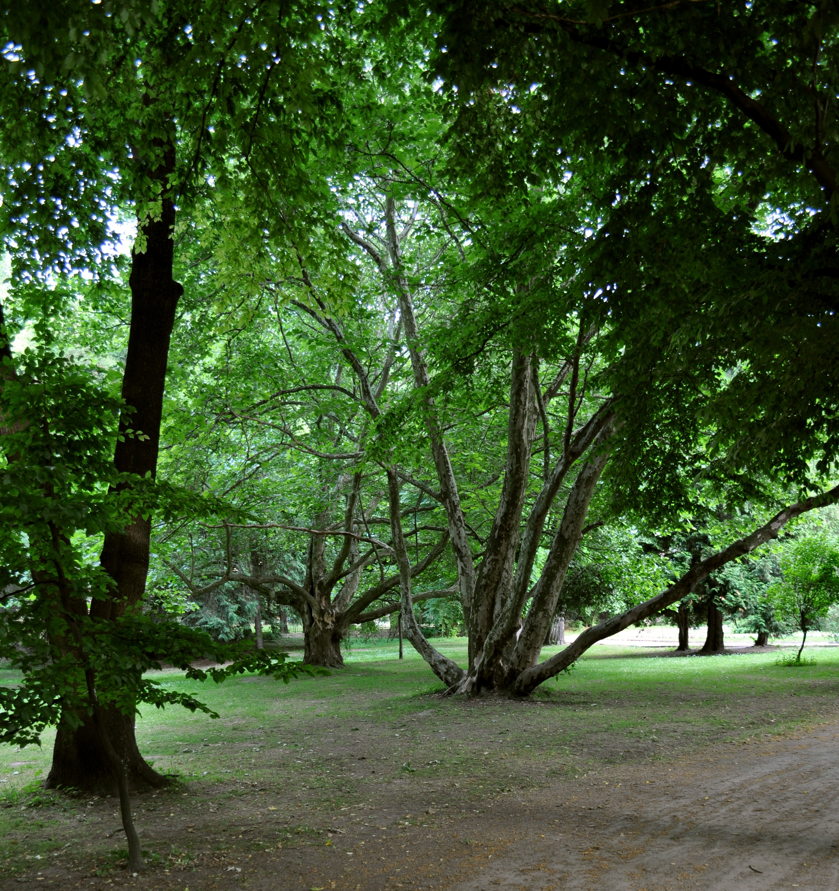 Przeworsk - park w zespole pałacowym Lubimirskich